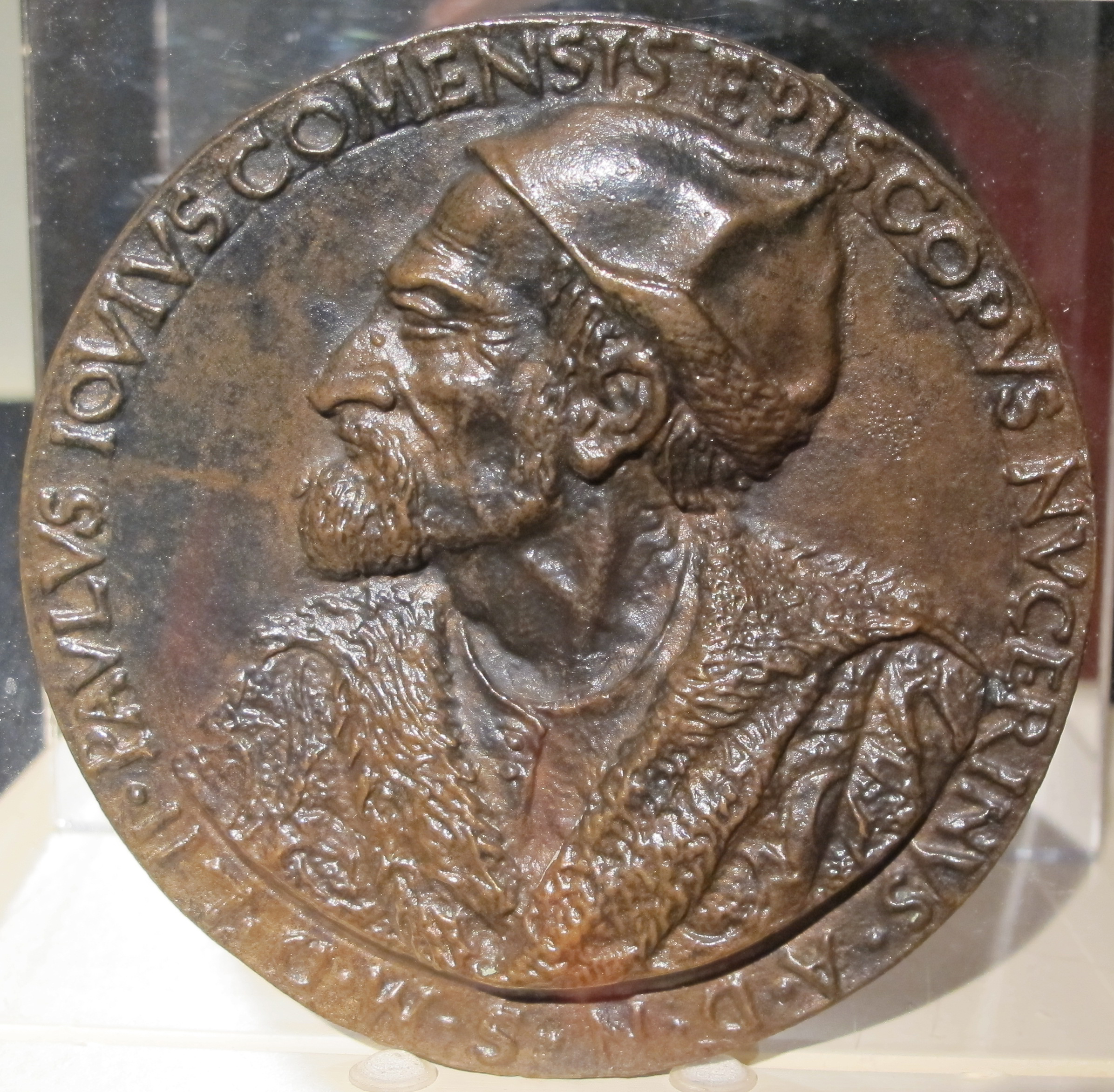 Medaglia di Paolo Giovio (1483-1552), 1522